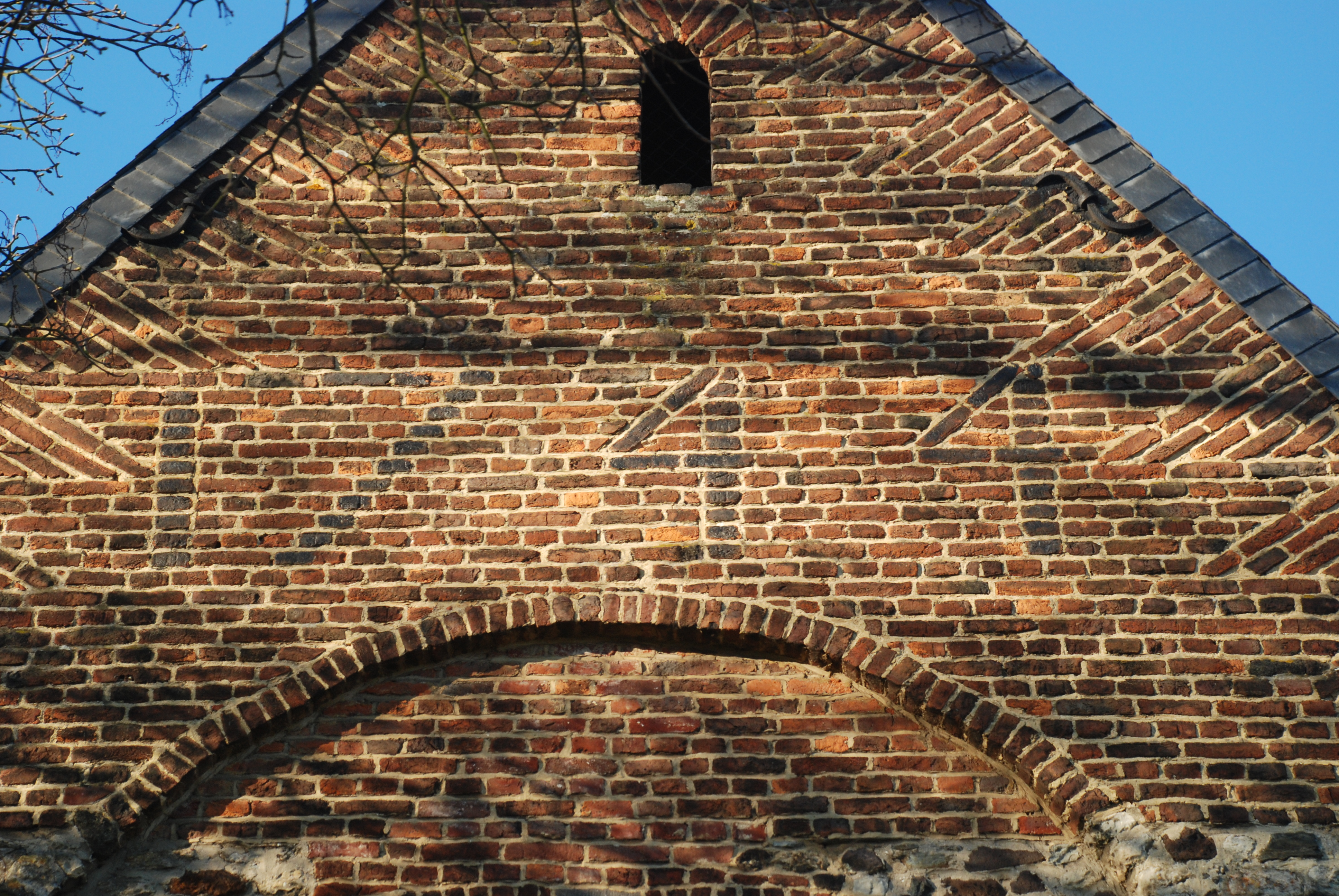 Belgique - Wallonie - Église Notre-Dame de Mousty